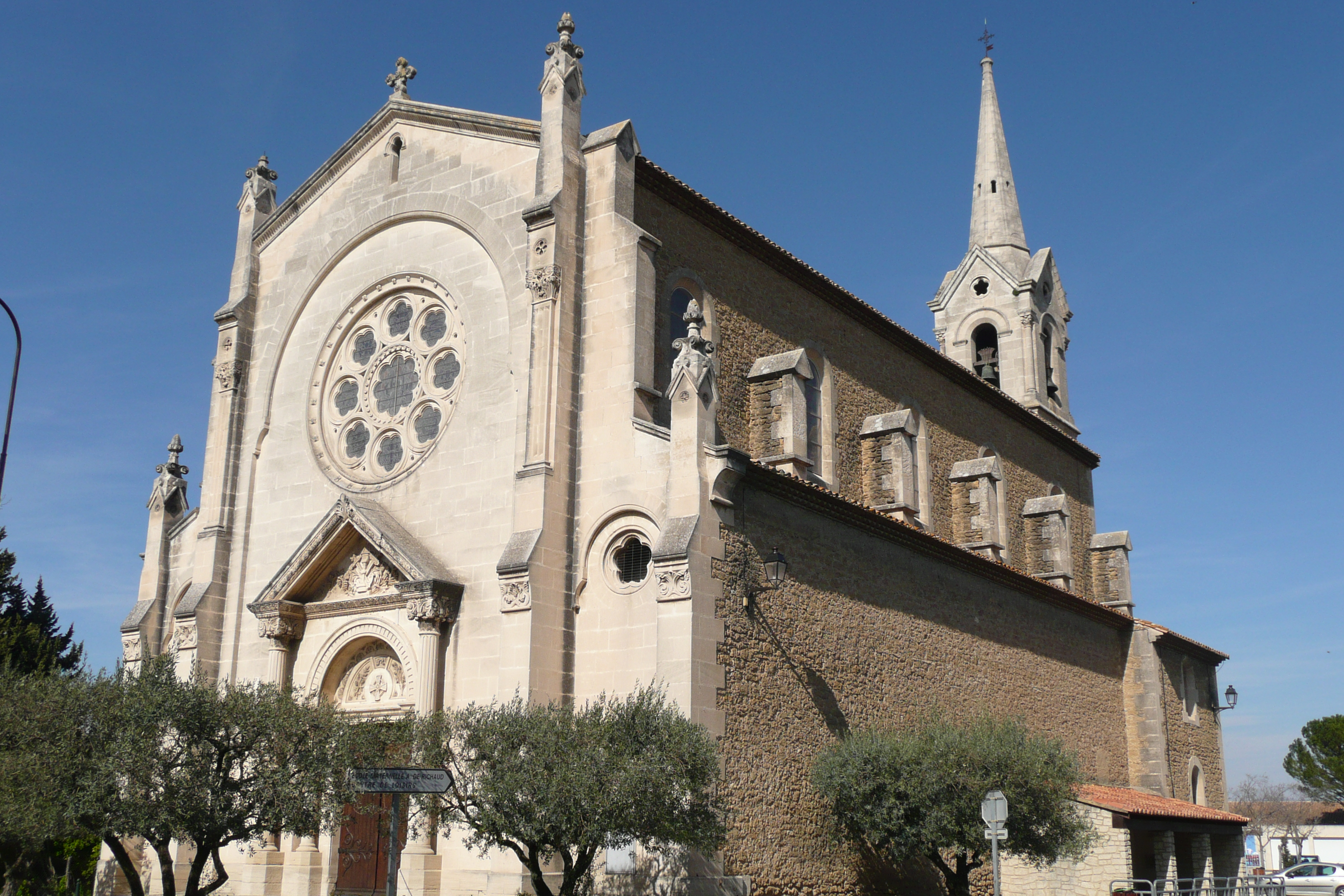 Eglise à Athen des Paluds.